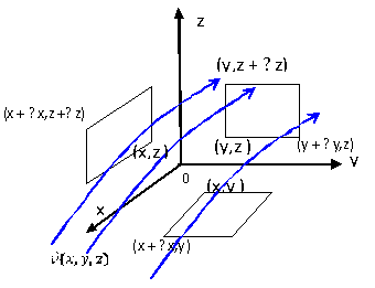 Векторско поље кроз инфитезималне контуре у Декартовим равнима